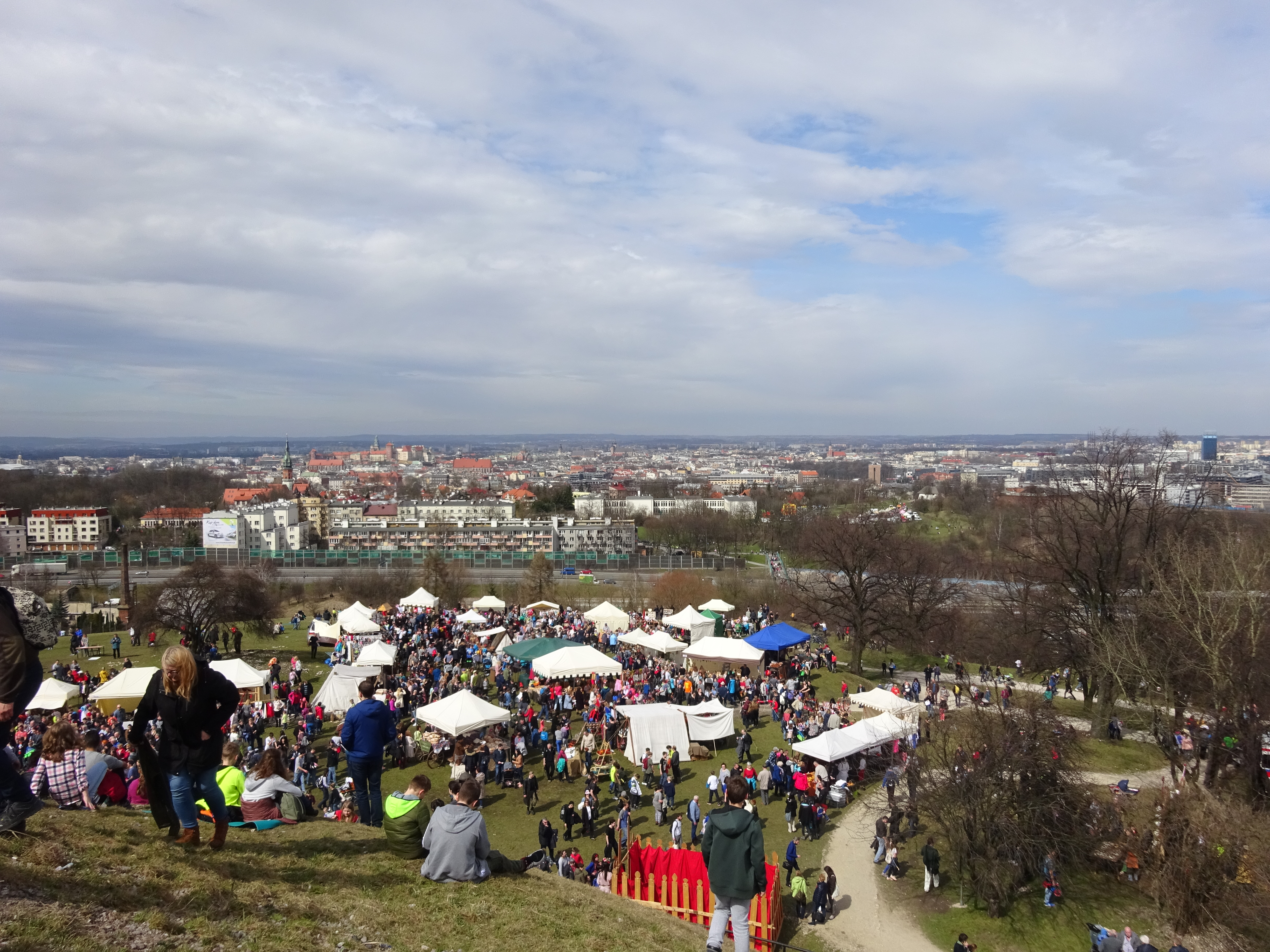 Święto Rękawki pod Kopcem Kraka i w oddali pod Kościółkiem św. Benedykta, widziane z Kopca Kraka. W tle centrum Krakowa. Wtorek po Wielkanocy, 3 kwietnia 2018.